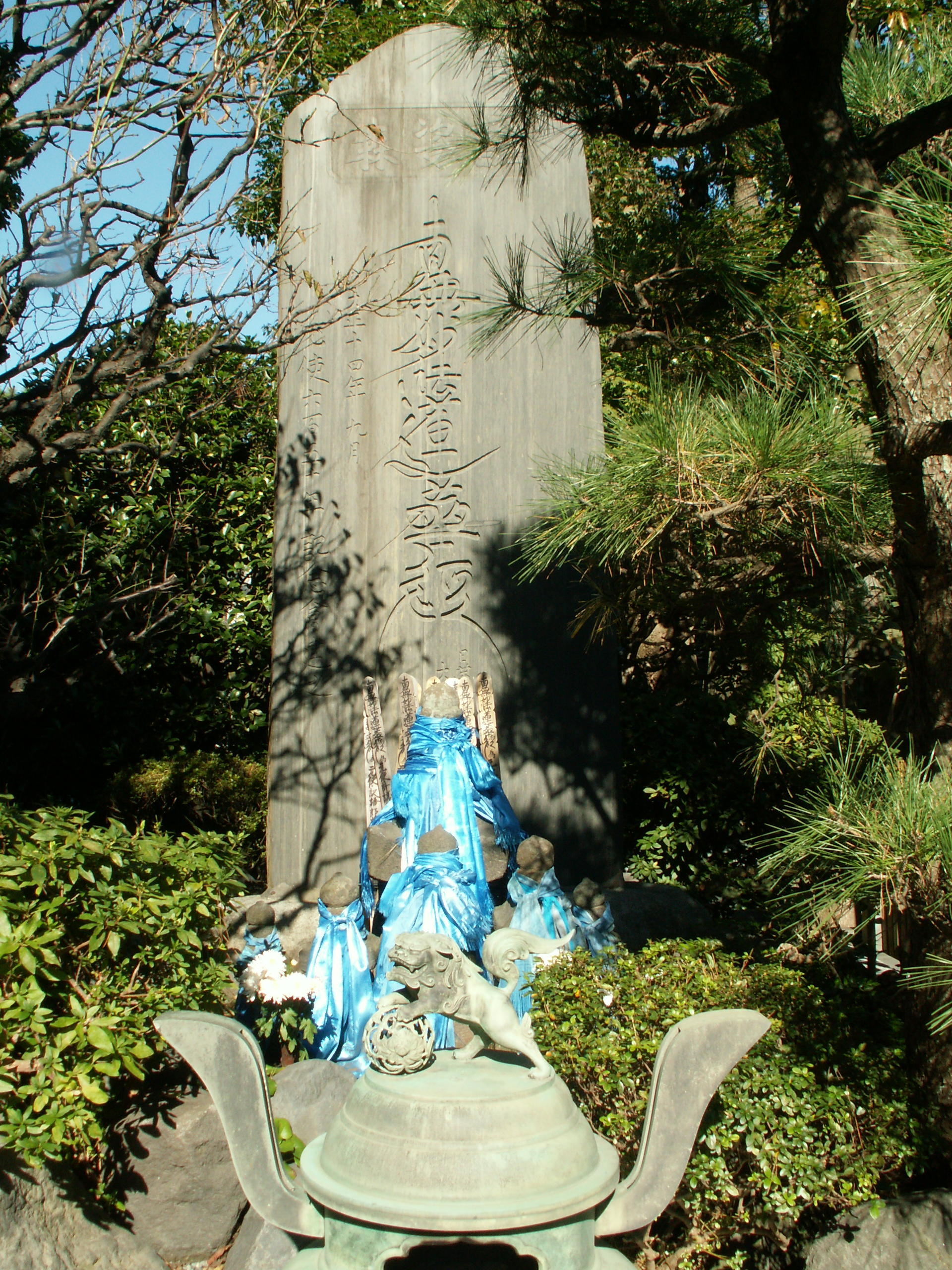 常立寺元使塚